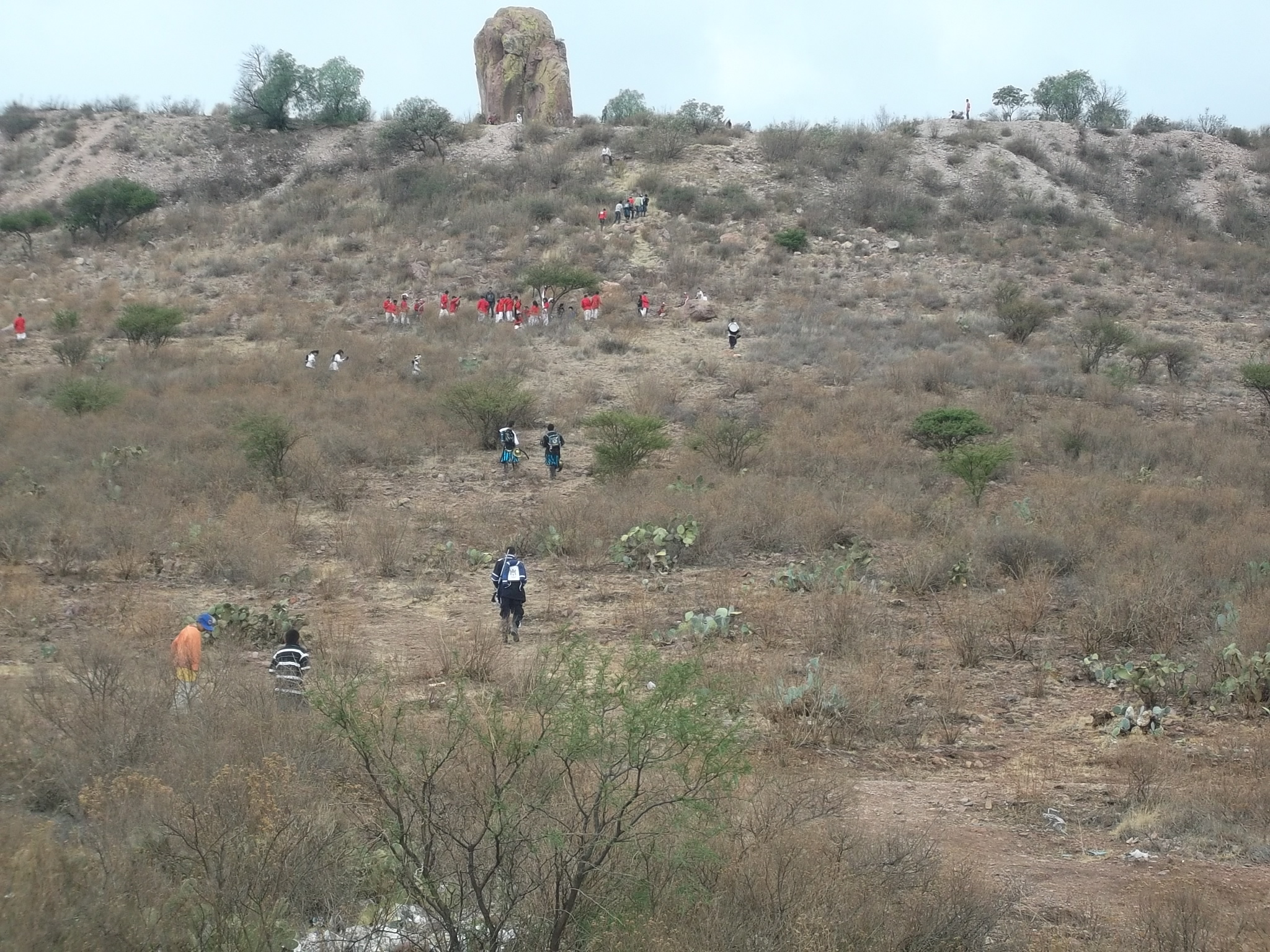 subiendo al cerro